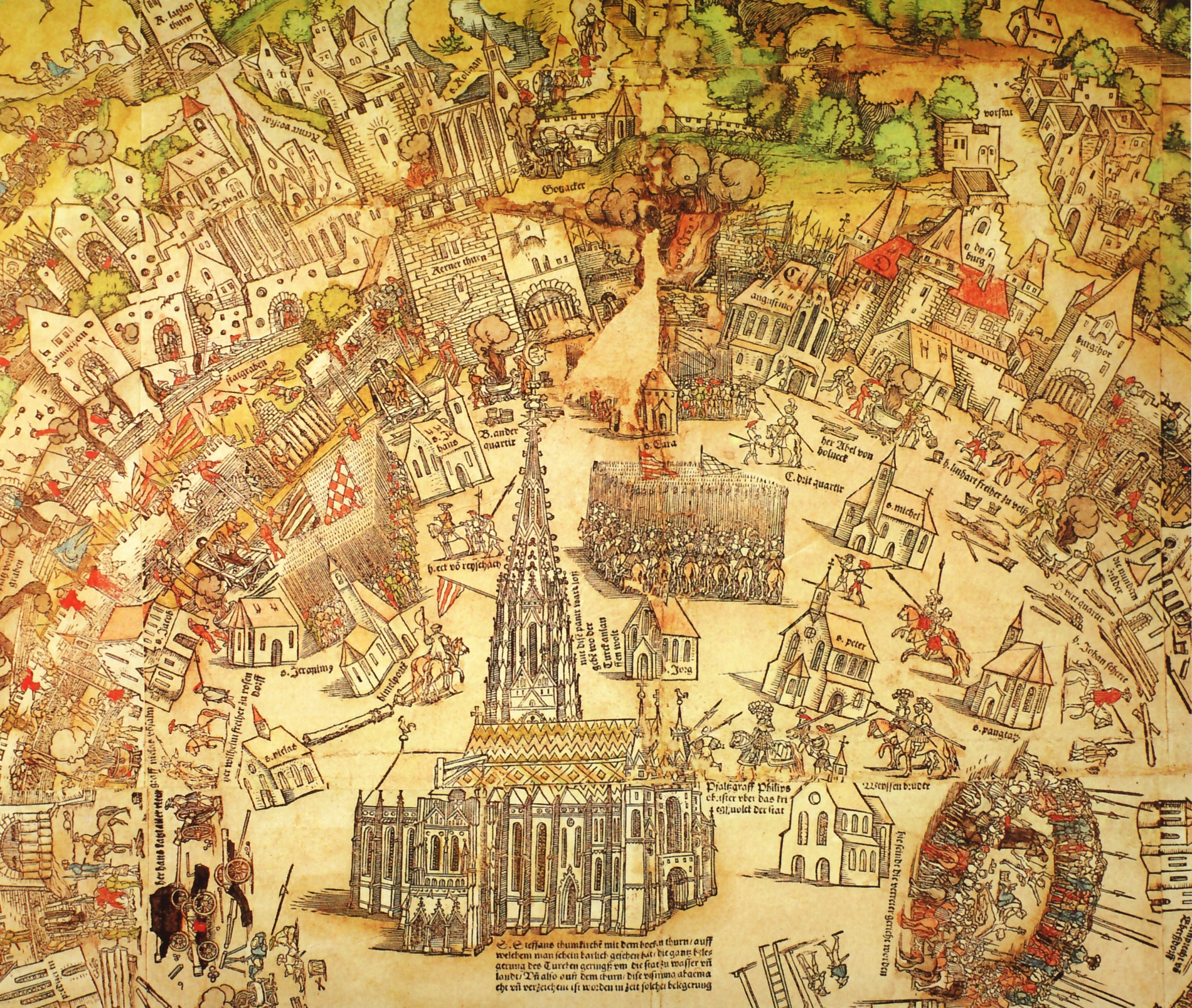 Nikolaus Meldemann Description German printer Date of birth/death1552Location of birthNurembergAuthority control VIAF: 32899365 LCCN: nr94029931 GND: 123253756 ISNI: 0000 0001 0963 5676 WorldCat Detail from Rundansicht der Stadt Wien zur Zeit der Ersten Türkenbelagerung Wiens (Nürnberg 1530), kolorierter Holzschnitt, 81,2 x 85,6 cm (Wien Museum, Inv. Nr. 48.068), Ausschnitt des Zentrums mit dem Stephansdom